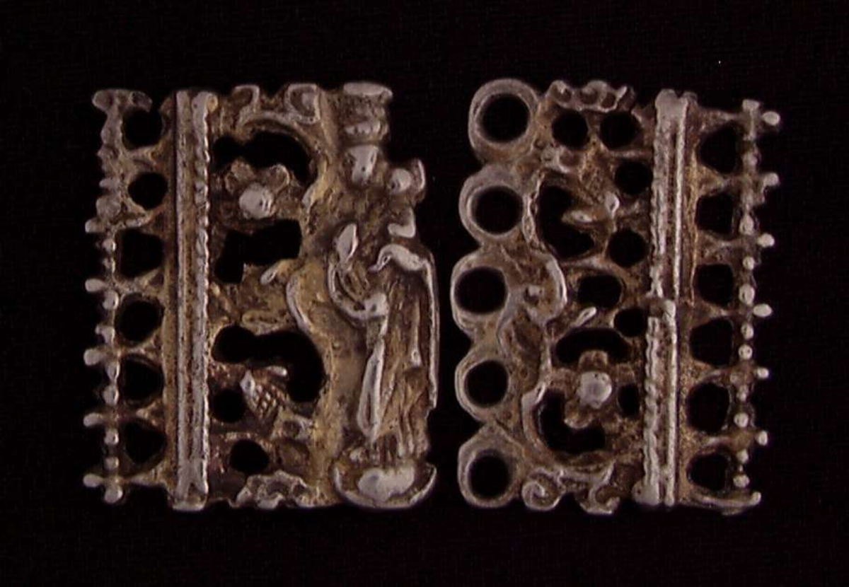 Kambespenne kalles denne middelalderpregede draktspennen fra Herdla i Hordaland. Den er støpt i sølv og forgylt. På midten har denne en fremstilling av Maria med barnet. Kambespenner har vært brukt på Vestlandet, og i Skåne er de brukt helt opp til vår tid. Foto Anne-Lise Reinsfelt / Norsk Folkemuseum, NF.1896-0289.